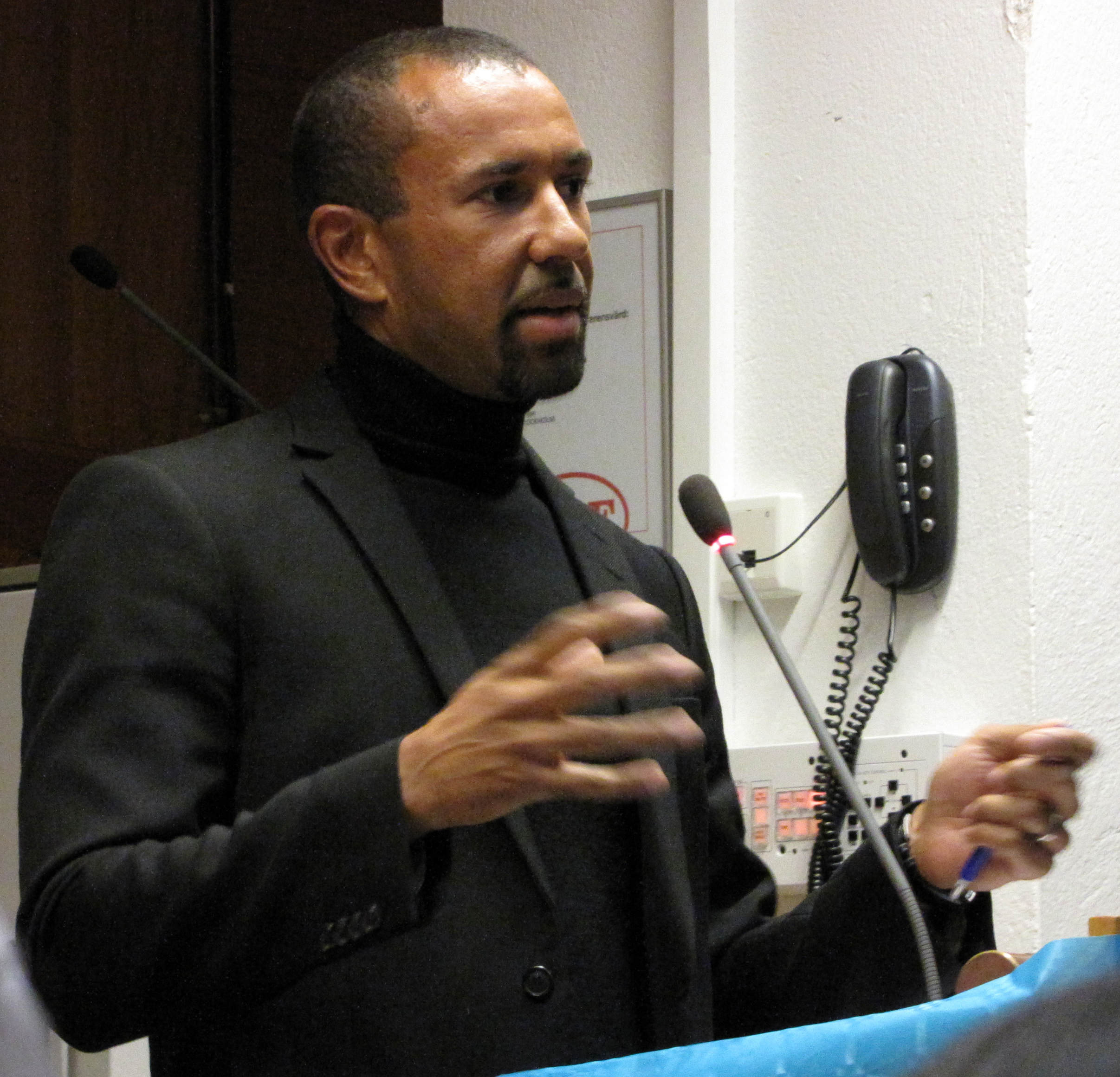 Journalisten Alex Voronov vid panelsamtal på ABF-huset i Stockholm.